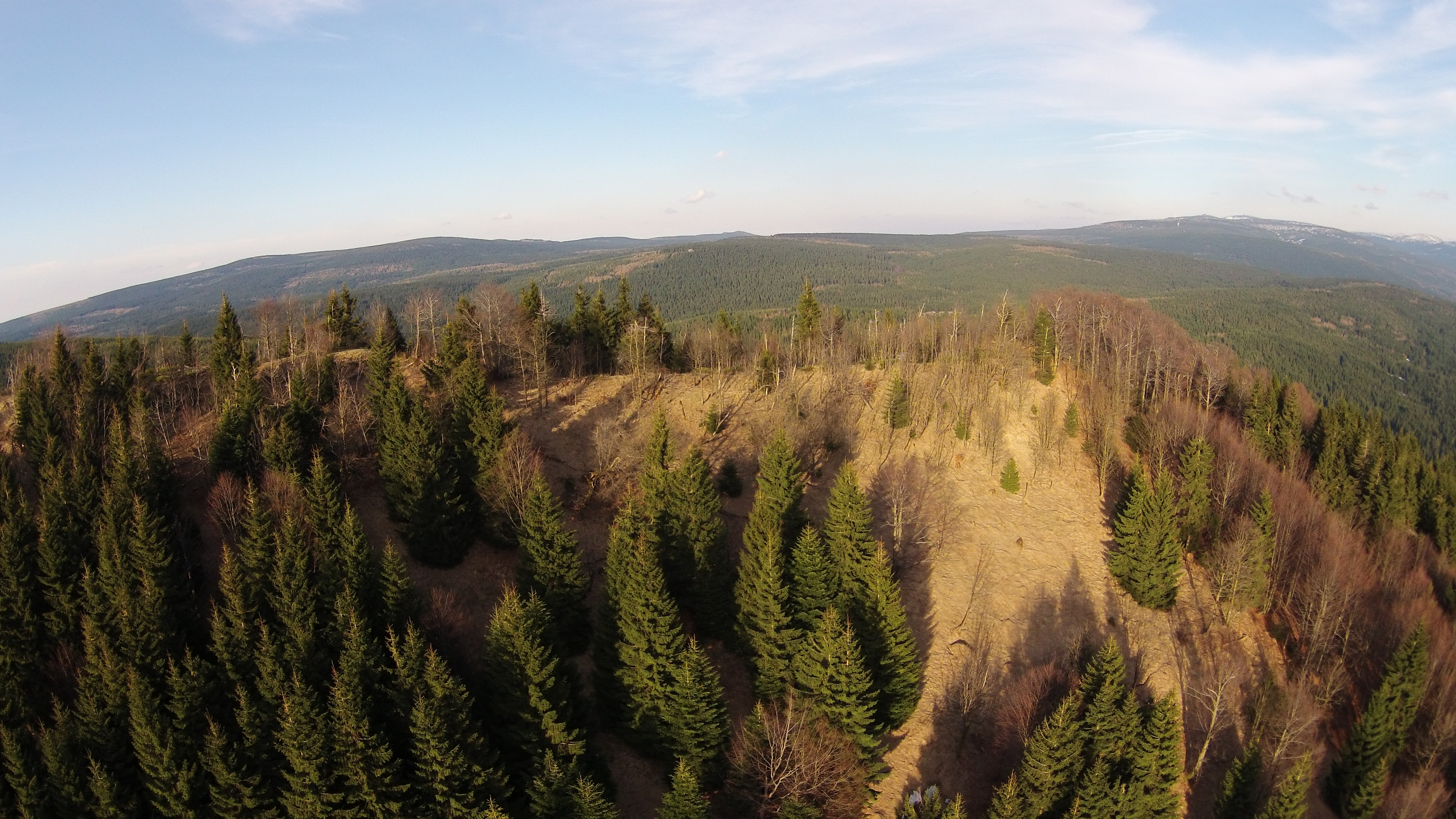 Bukovec (přírodní rezervace ze vzduchu)